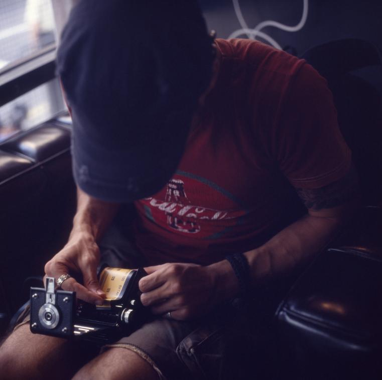 Única imagen de Víctor Rodríguez Latt